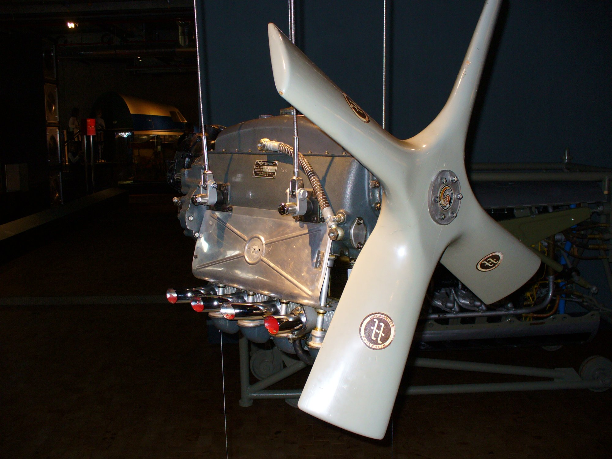 Zündapp 9-092, German aircraft engine